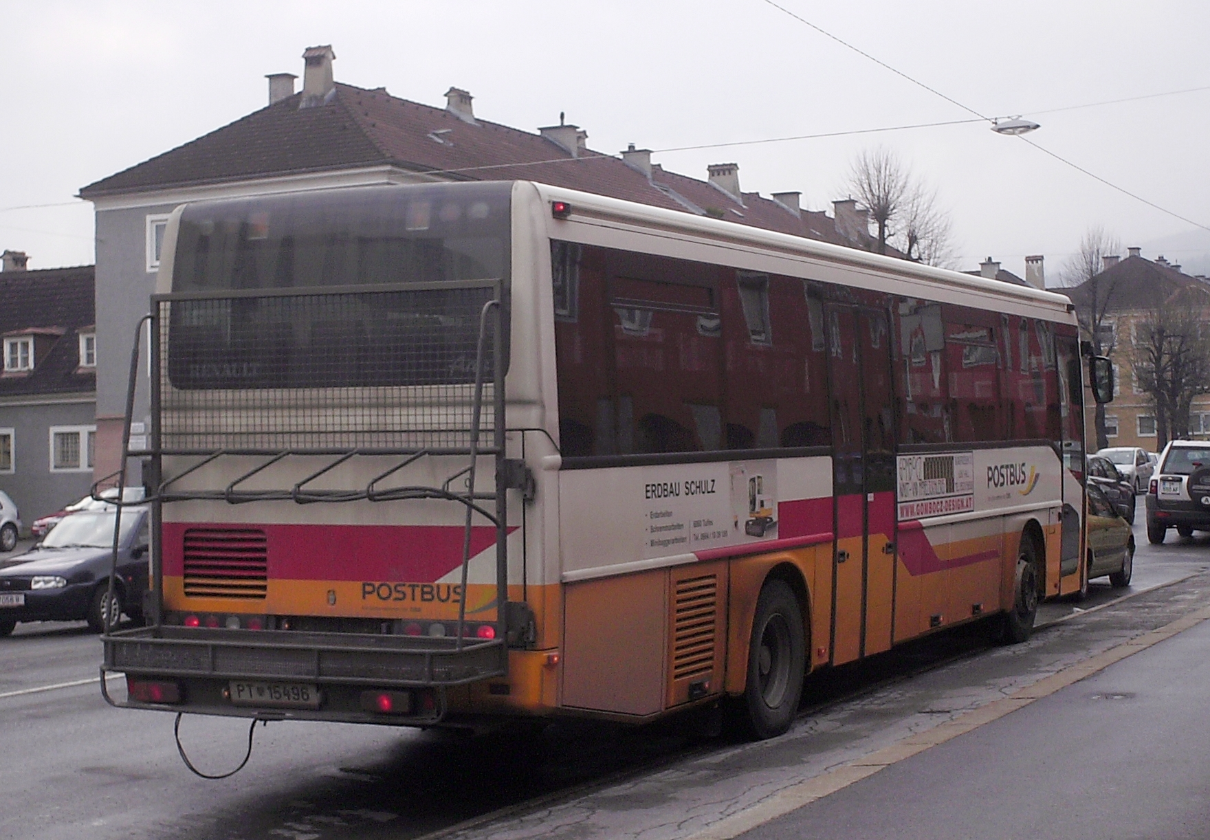 Postbus Wagen 15496 in Innsbruck